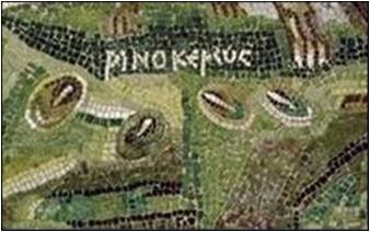 Mollusques sur un rocher portant un rhinocéros